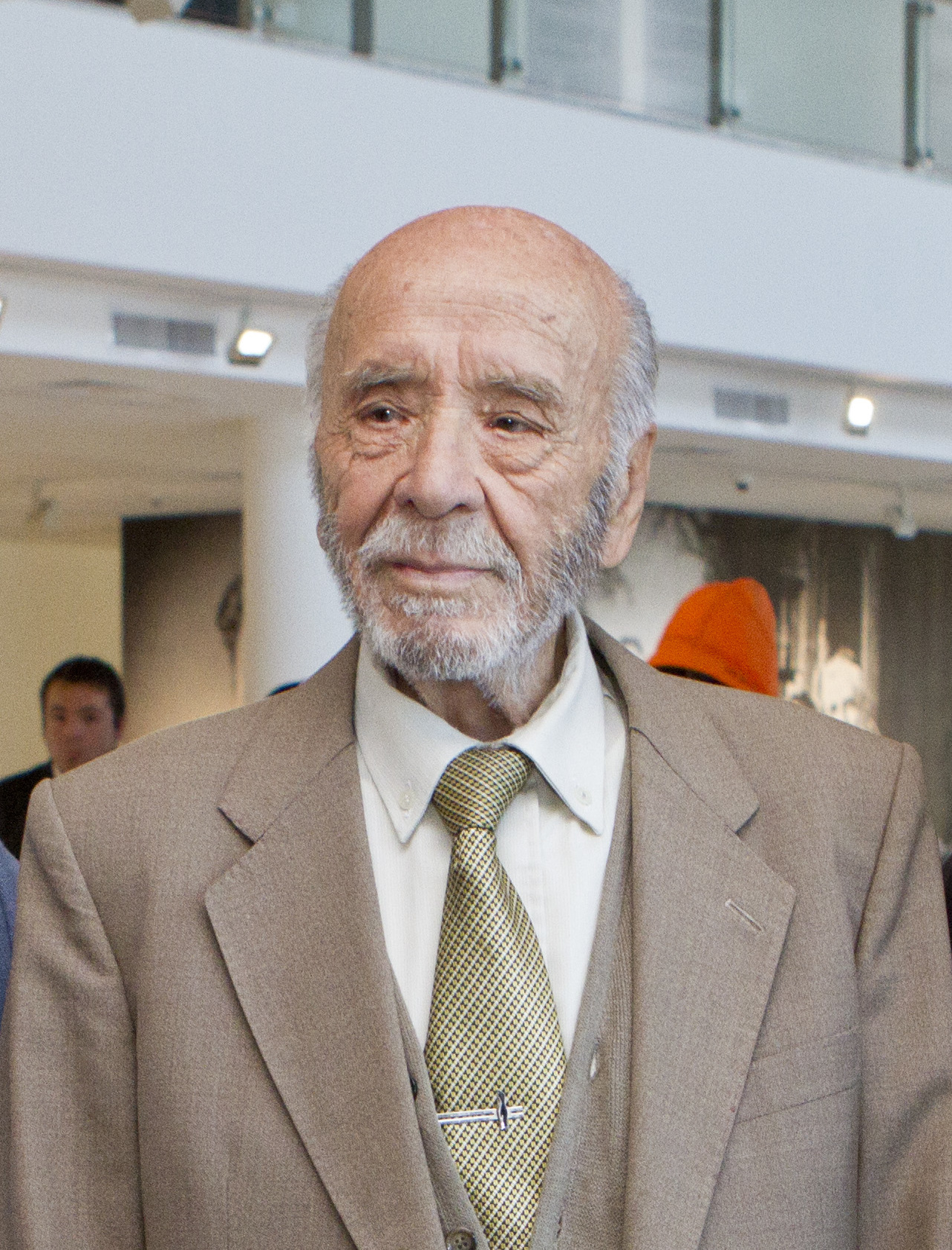 Buenos Aires, 27 de Septiembre de 2015 Se inauguró la insralación museológica permanente "Argentina en Antártida" en el Museo Malvinas e Islas del Atlántico Sur. En la inauguración participaron Jorge Giles, director del Museo Malvinas, Mariano Memolli, director de la Dirección Nacional del Antártico y el General Jorge Edgar Leal, fundador de la Base Antártica Esperanza y jefe de la primera expedición terrestre en Argentina al Polo Sur. También se llevo a cabo un pasaje artístico a cargo de Ronda Cultural y el cuerpo de baile de Andrea Castelli. Fotos: Silvina Frydlewsky / Ministerio de Cultura de la Nación